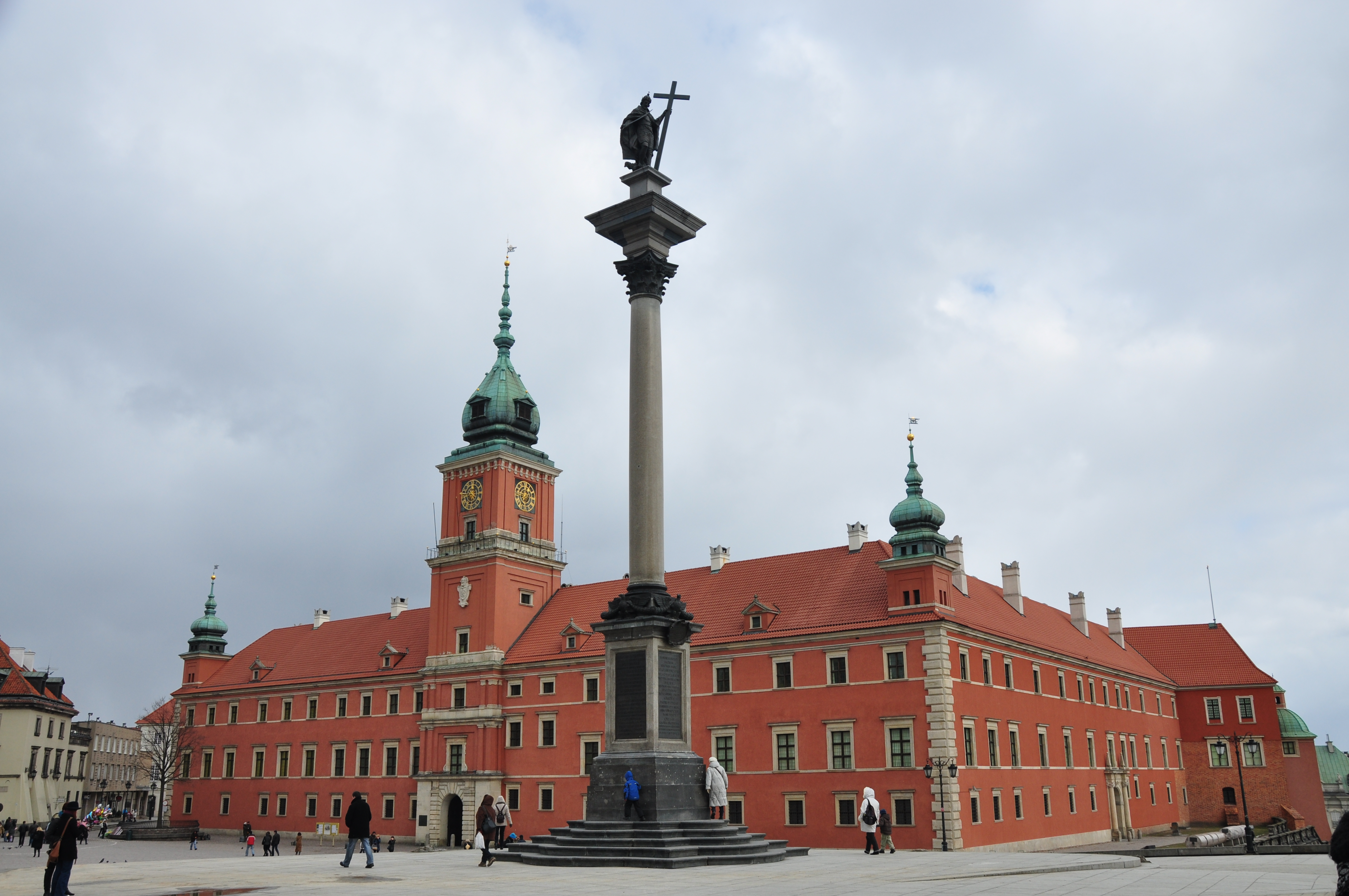 Warszawa - Zamek Królewski